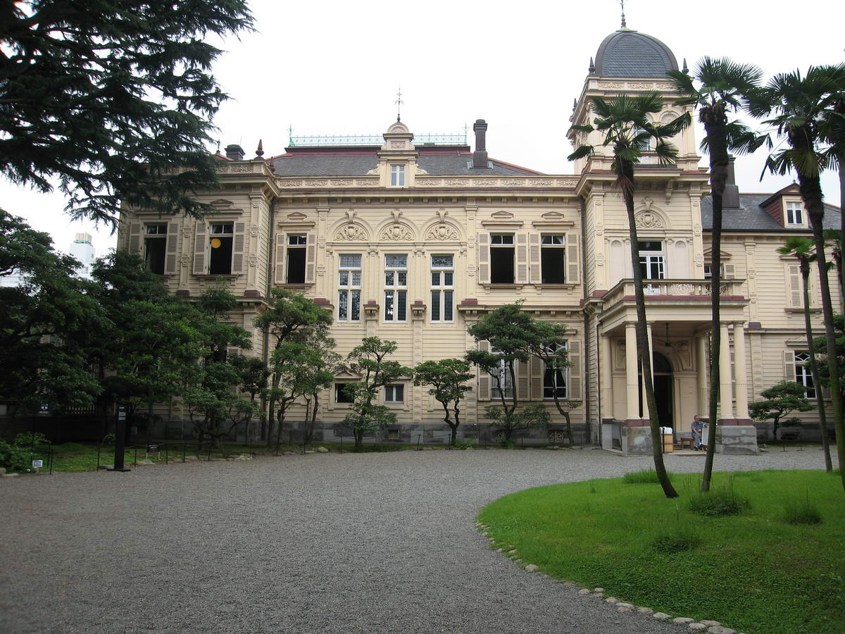 旧岩崎邸(旧岩崎邸庭園・台東区池之端)